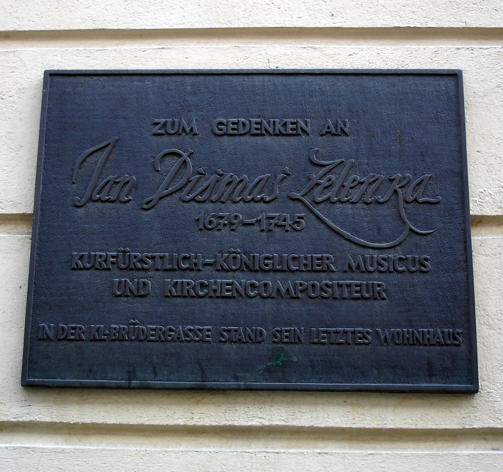 Gedenkplatte von Vinzenz Wanitschke für Jan Dismas Zelenka in der Kleinen Brüdergasse in Dresden.